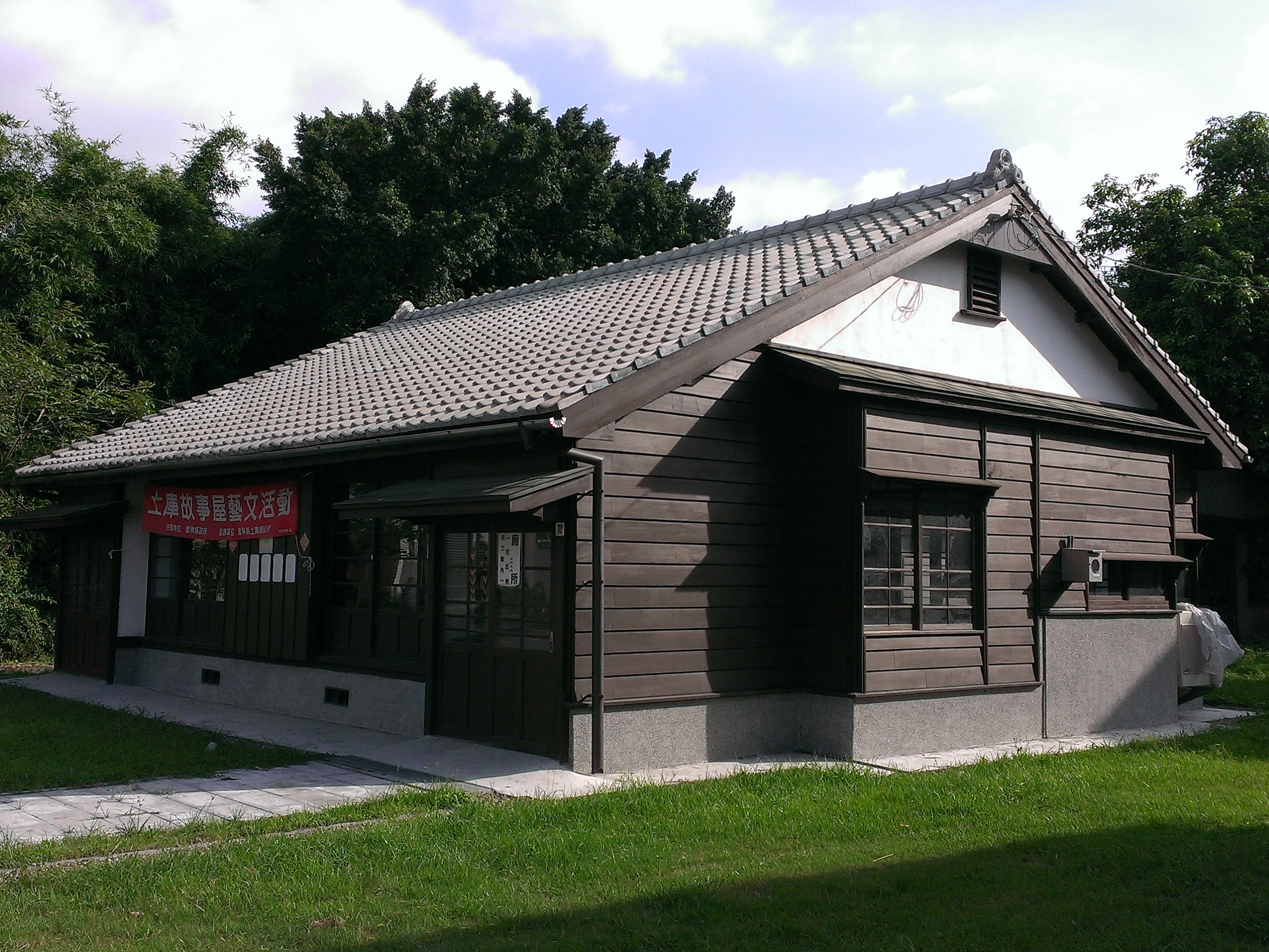 土庫鎮公所舊宿舍，後為土庫故事屋